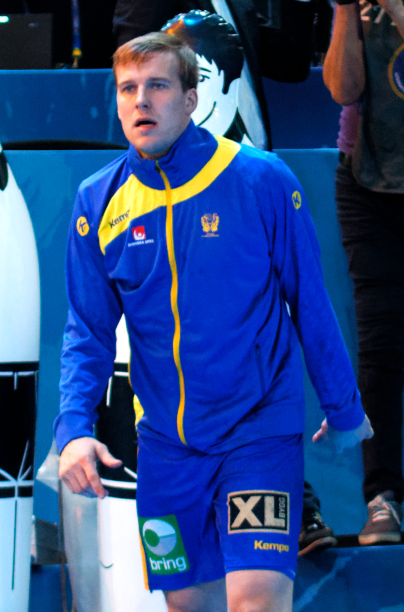 Match de la phase préliminaire du championnat du monde masculin de handball 2017 entre la Suède et le Danemark (Groupe D). A Bercy, le 16 janvier 2017.